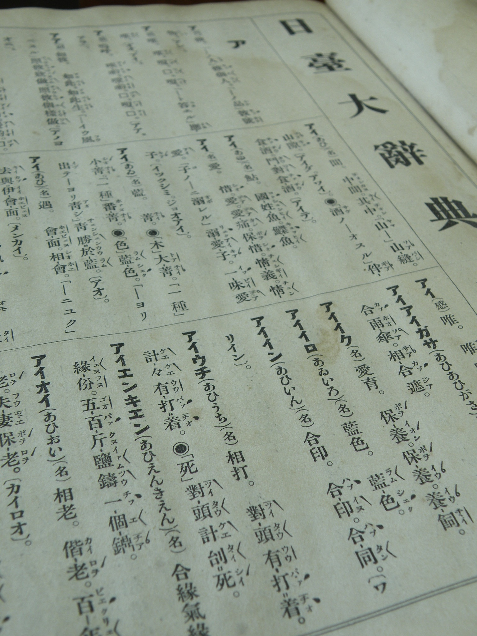 Japanese-Taiwanese Dictionary (日臺大辭典 Nittai daijiten)